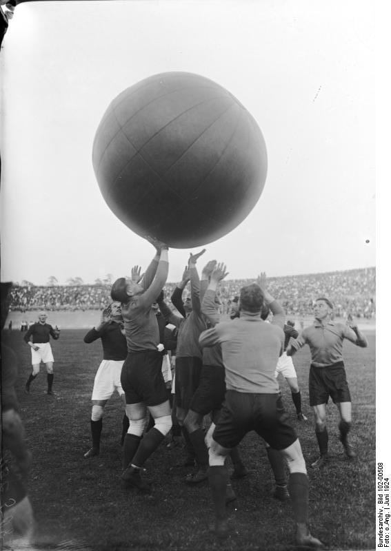 Das große nationale Jubiläums-Sportfest im deutschen Stadion. Das Pushballspiel, welches erstmalig in Deutschland gespielt wurde. Moment aus dem Spiel mit dem 2 m großen Ball.